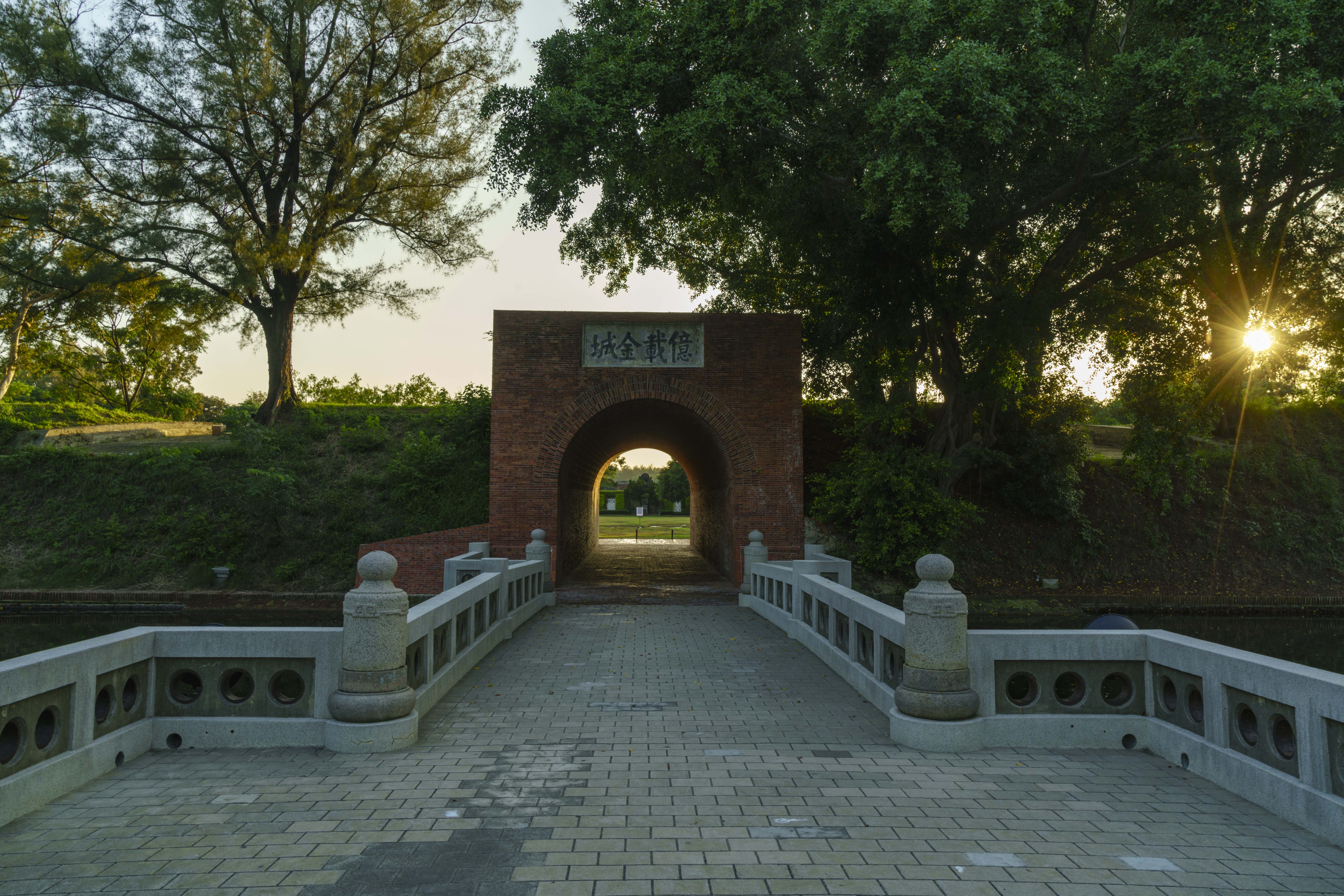 億載金城城門入口正門